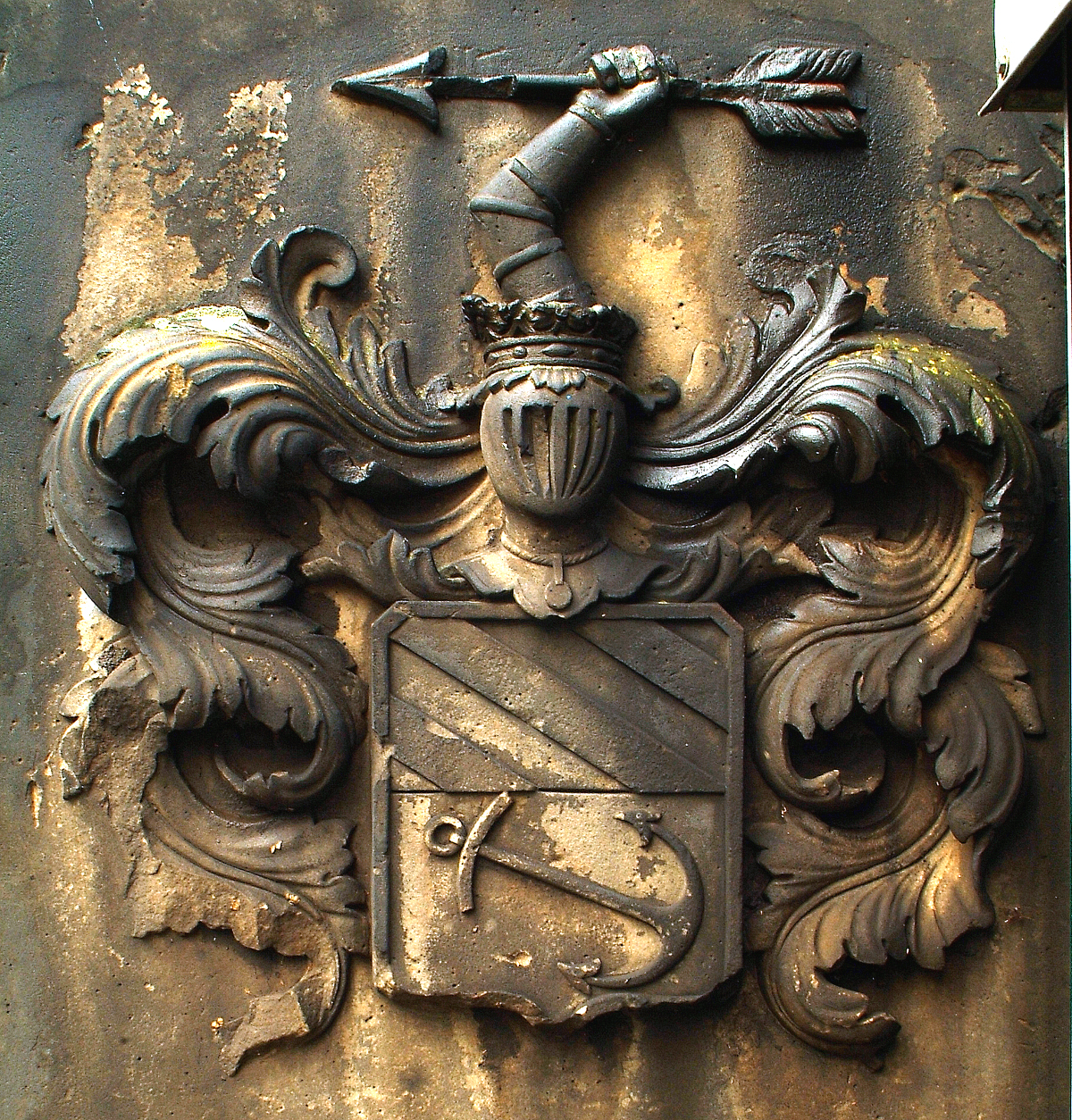 Wappen der Familie Schmitz-Grollenburg ...